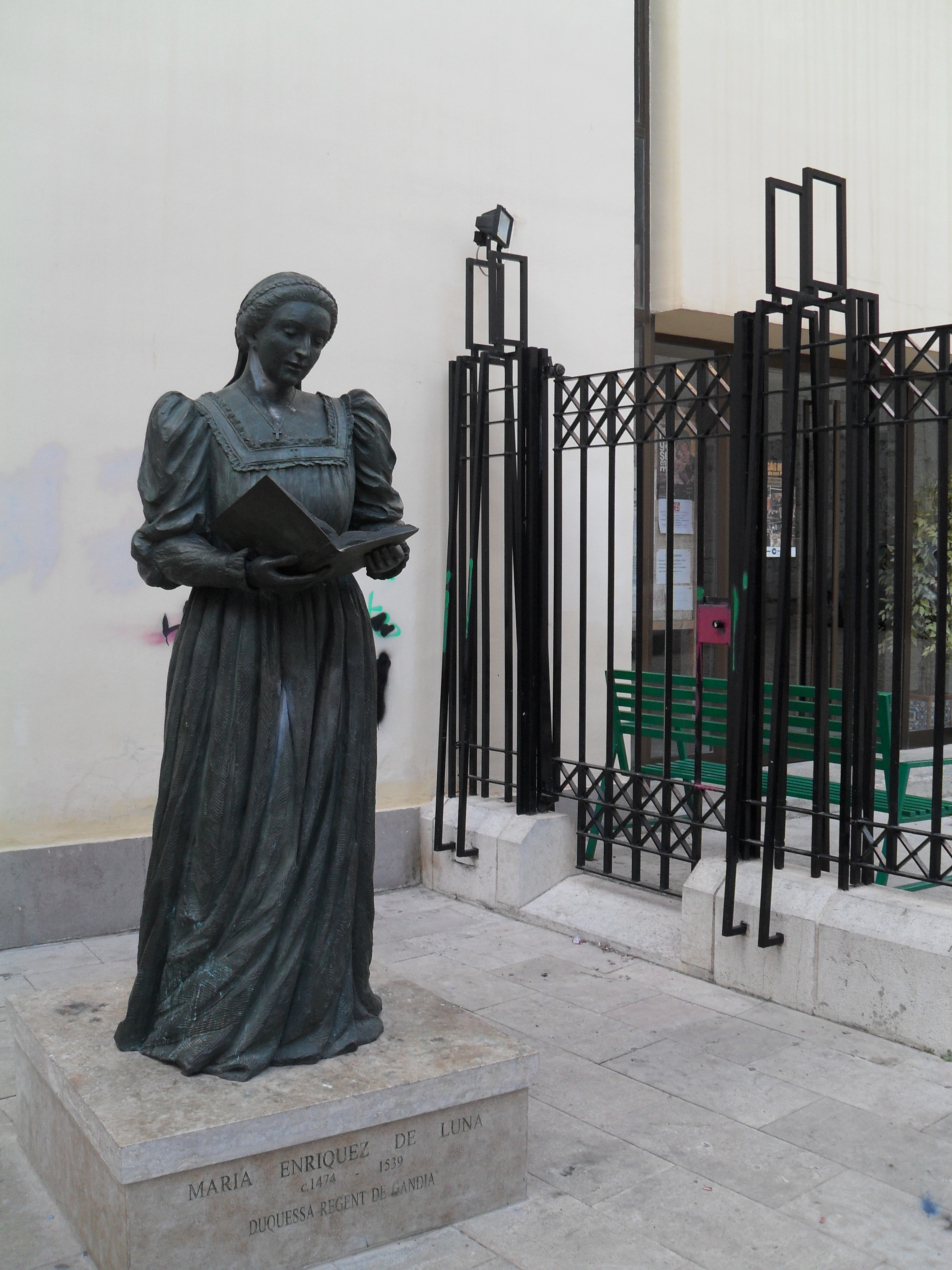 Monumento a María Enríquez en Gandía. Emplazamiento de 2013 junto a la Colegiata.